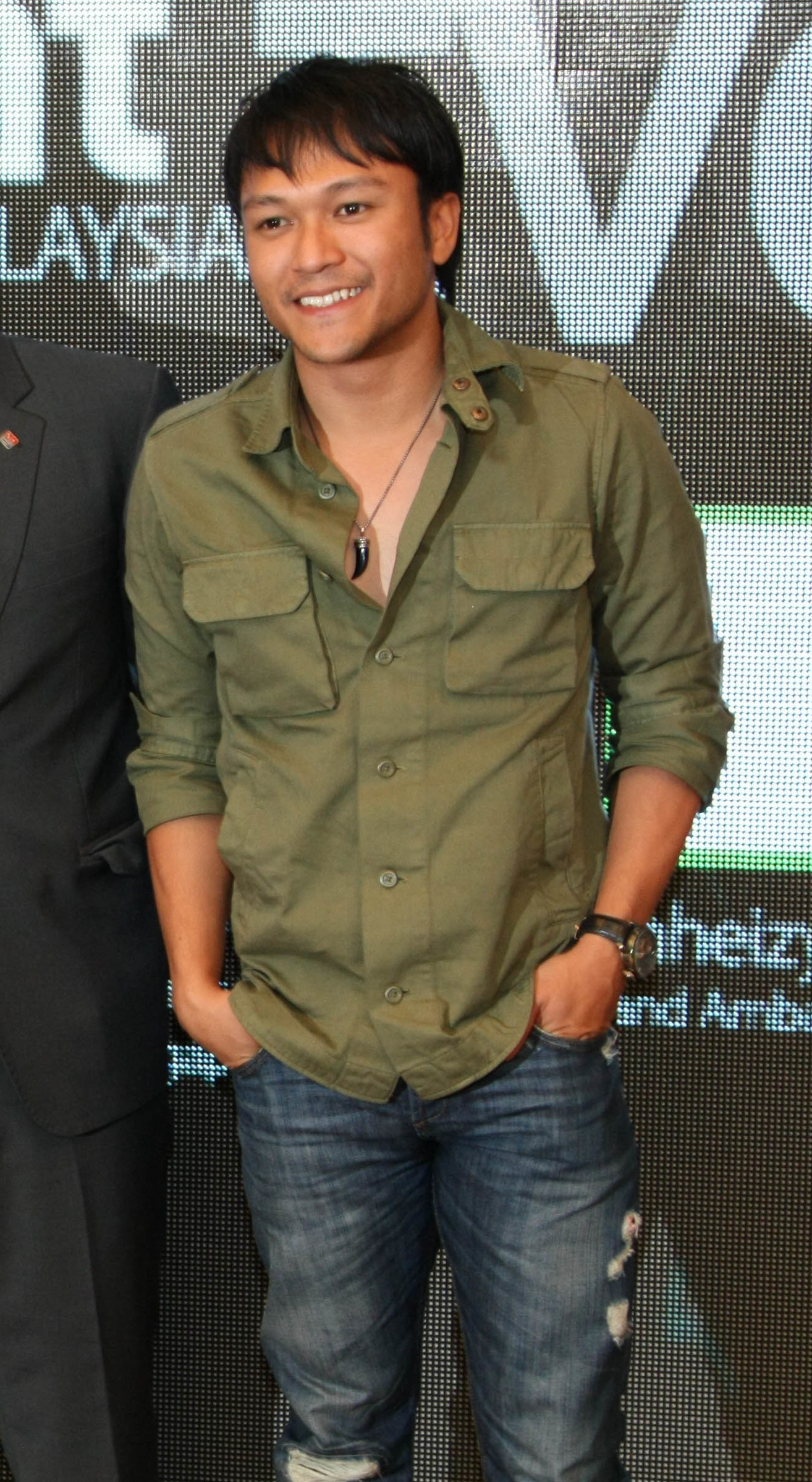 Duta WeChat: Shaheizy Sam